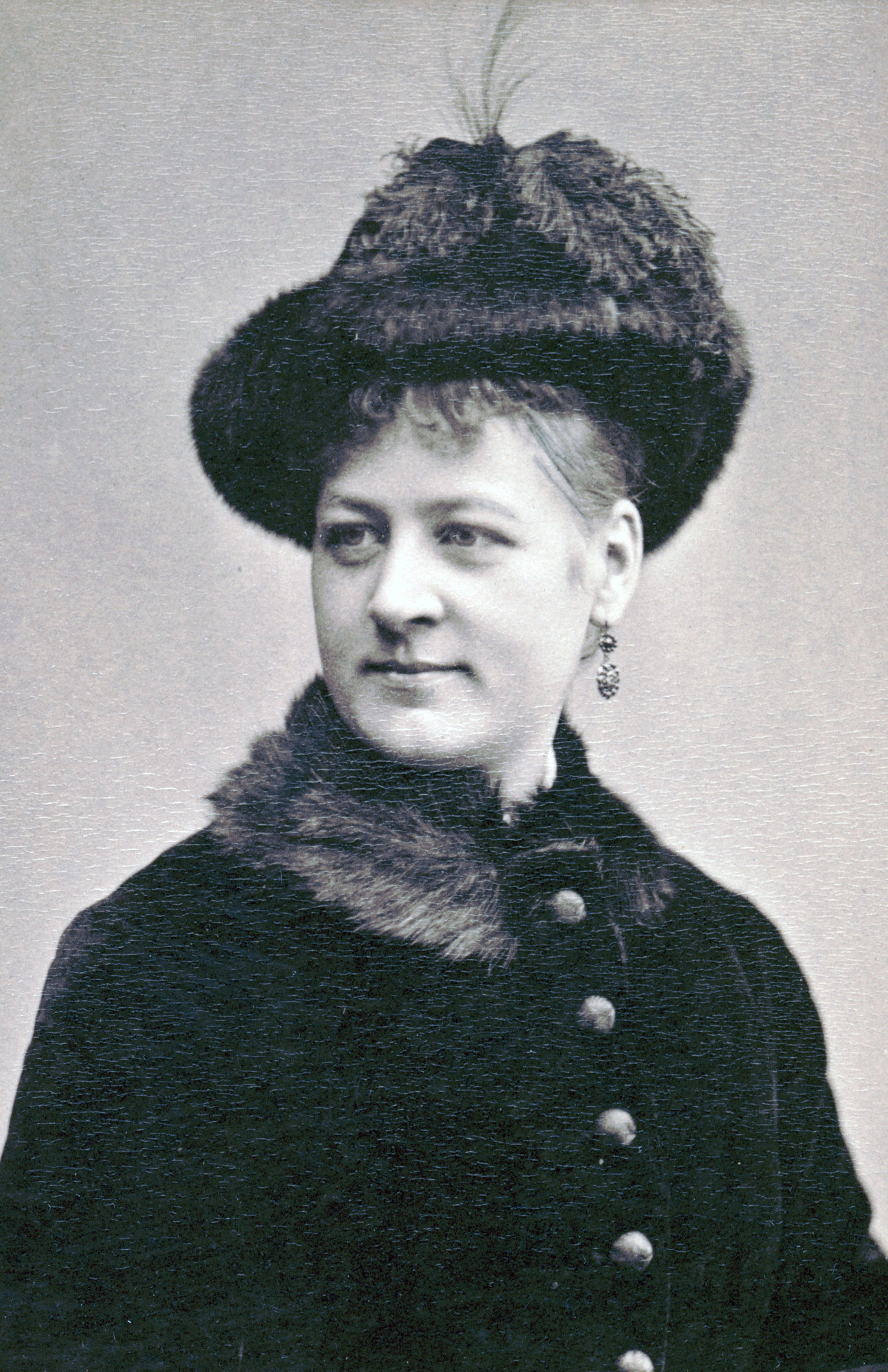 Hilma Schagerlund, skådespelare vid Södra teatern 1880